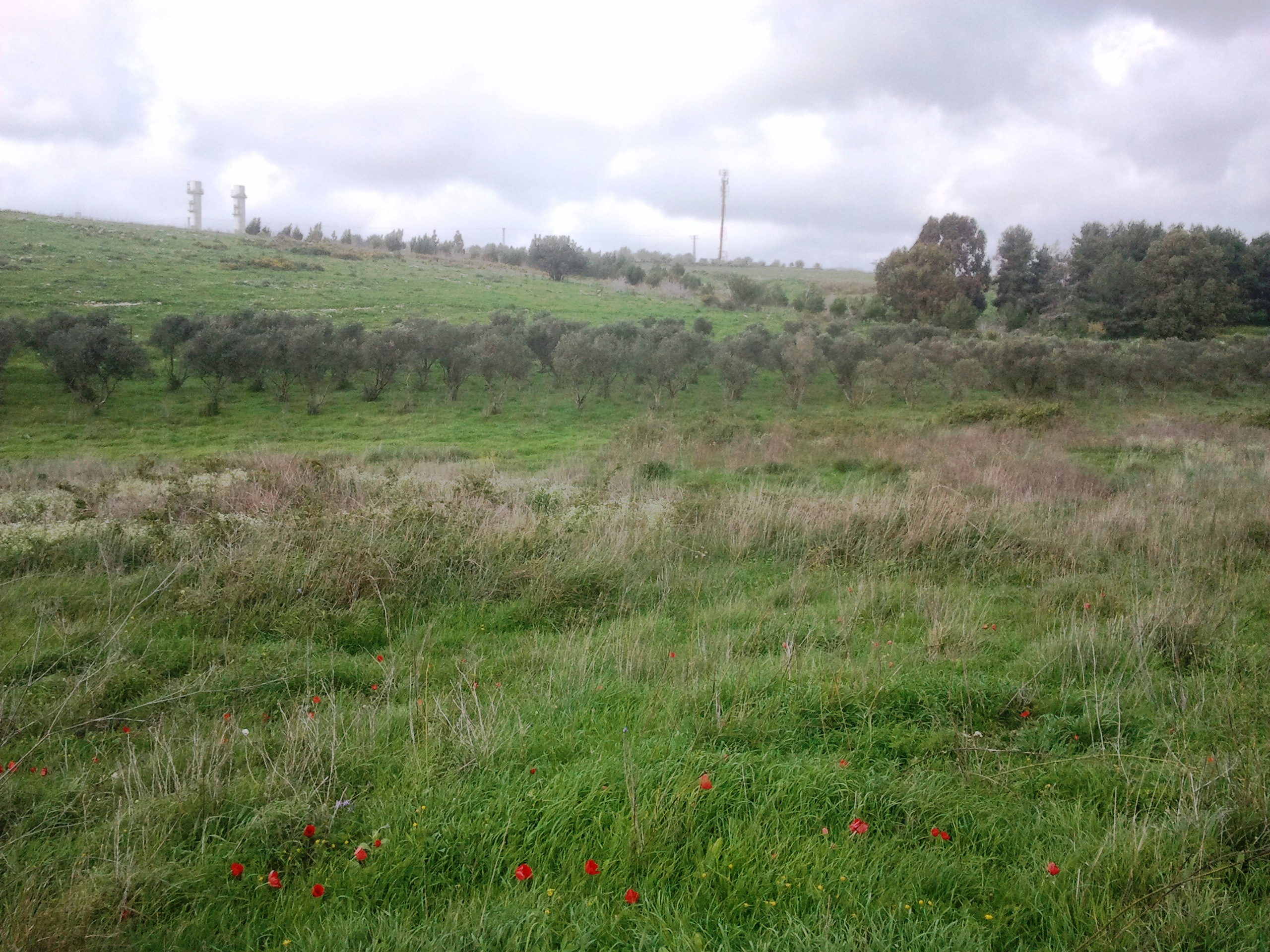 נחל תות הווה גבול בין הר הכרמל ורמות מנשה. תחילתו ליד מחלף אליקים והוא נשפך לנחל דליה ליד בת שלמה האזור ליד חורשת עצי הזית, כאן נמצאת נביעה